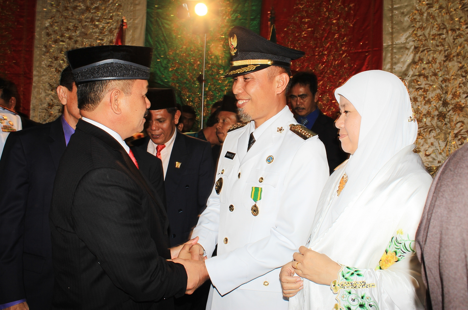 Pelantikan Wali Kota Mahyeldi